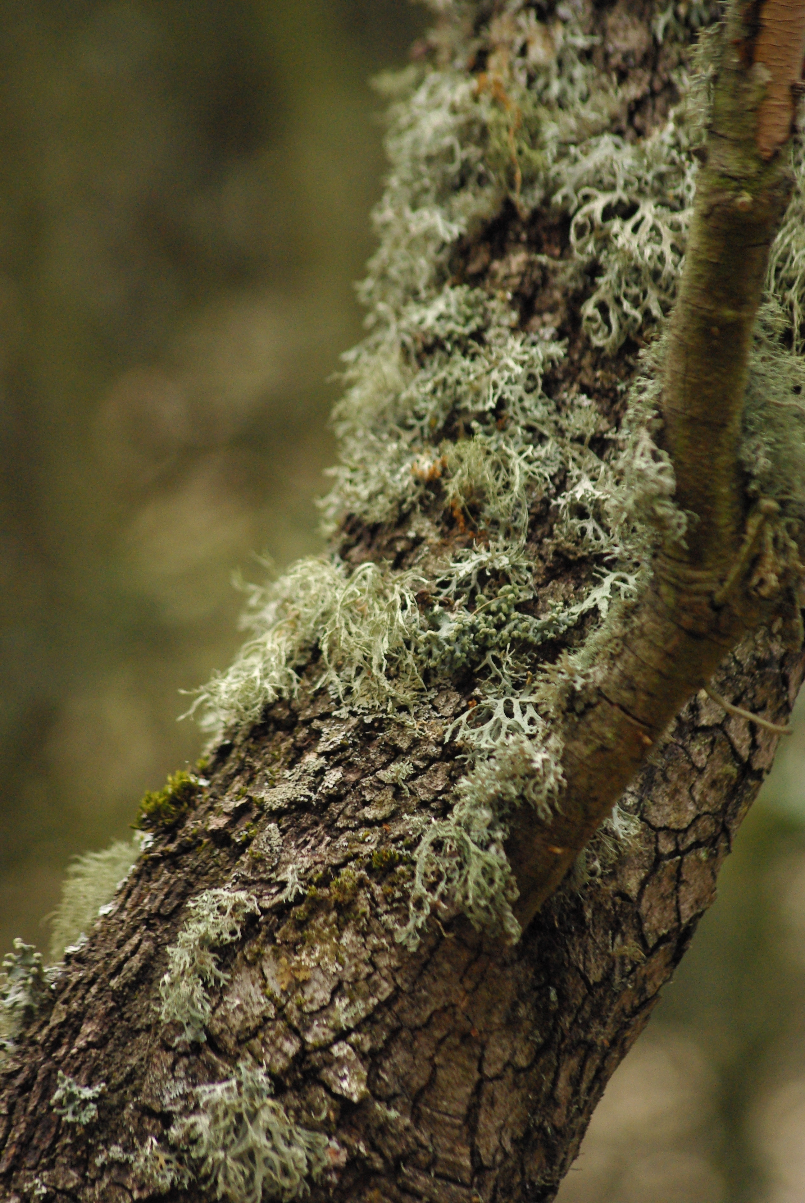 Liquen "Barbas de chivo"